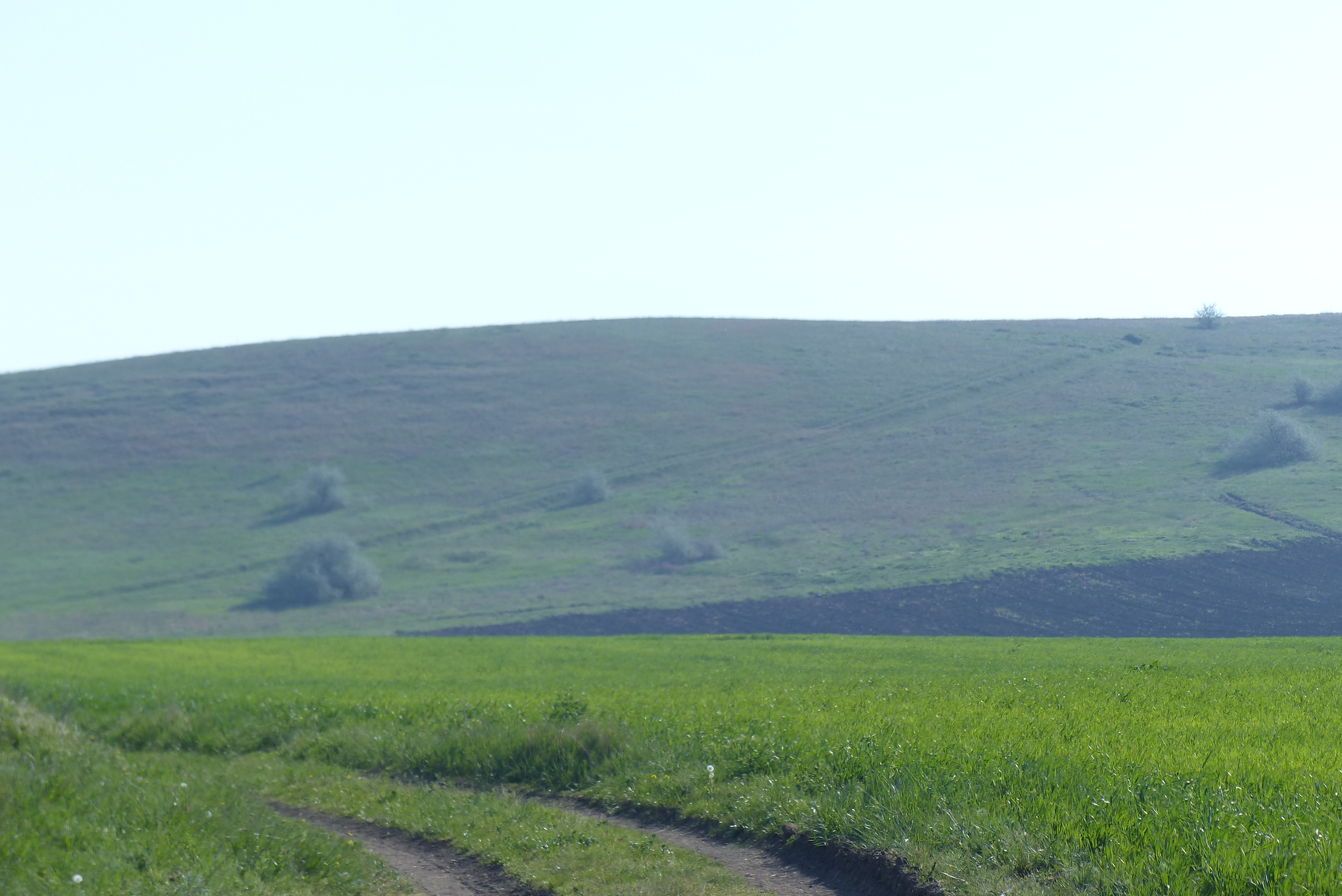 Sector de stepă în nordul Bugeacului, monument al naturii amplasat în Găgăuzia, satul Bugeac, la hotar cu raionul Cimișlia (cod MD-GE-amm.A-001) A-001